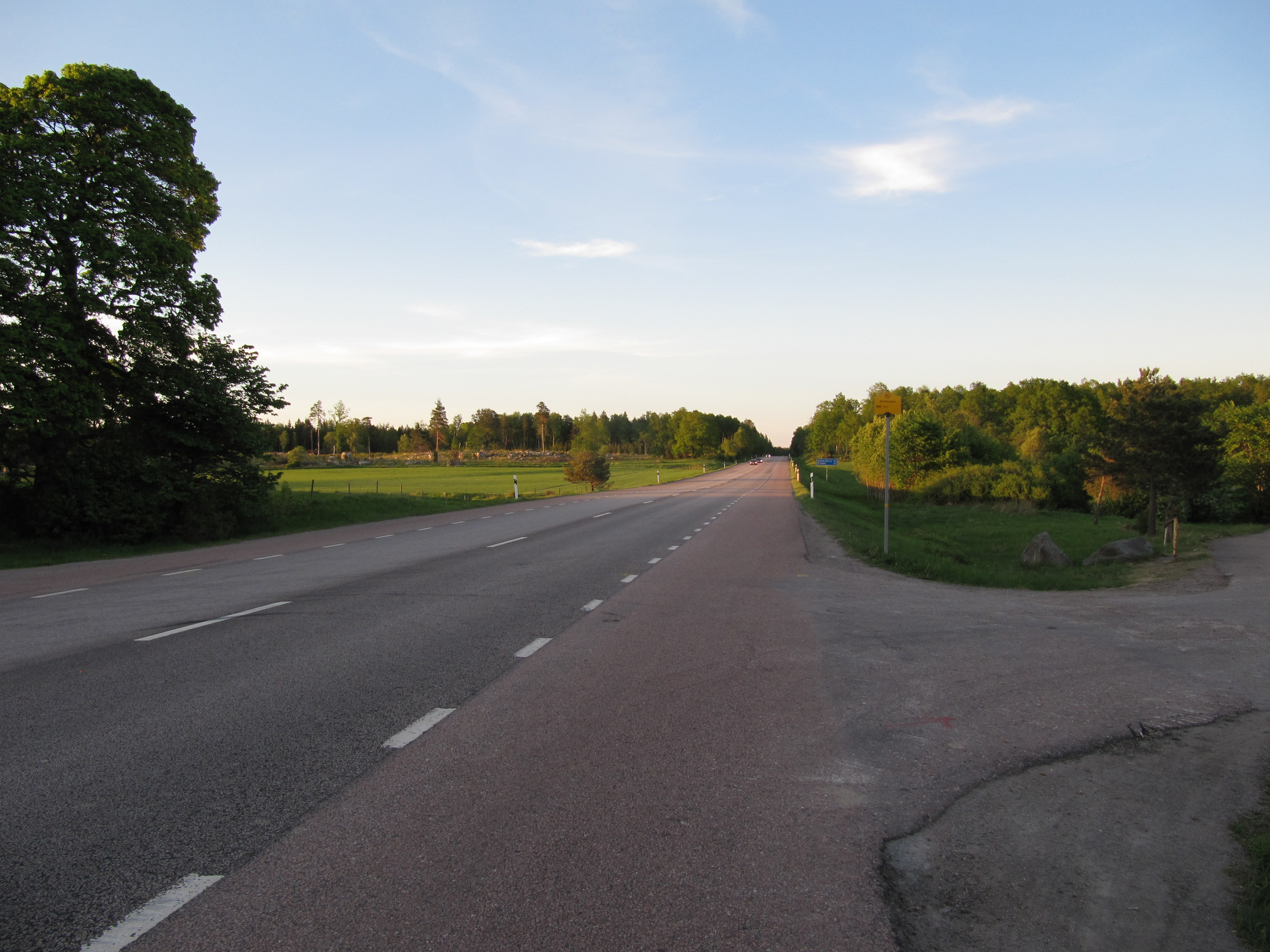 Riksväg 77 vid sjön Valloxen i riktning från Knivsta mot Husby-Långhundra och Norrtälje